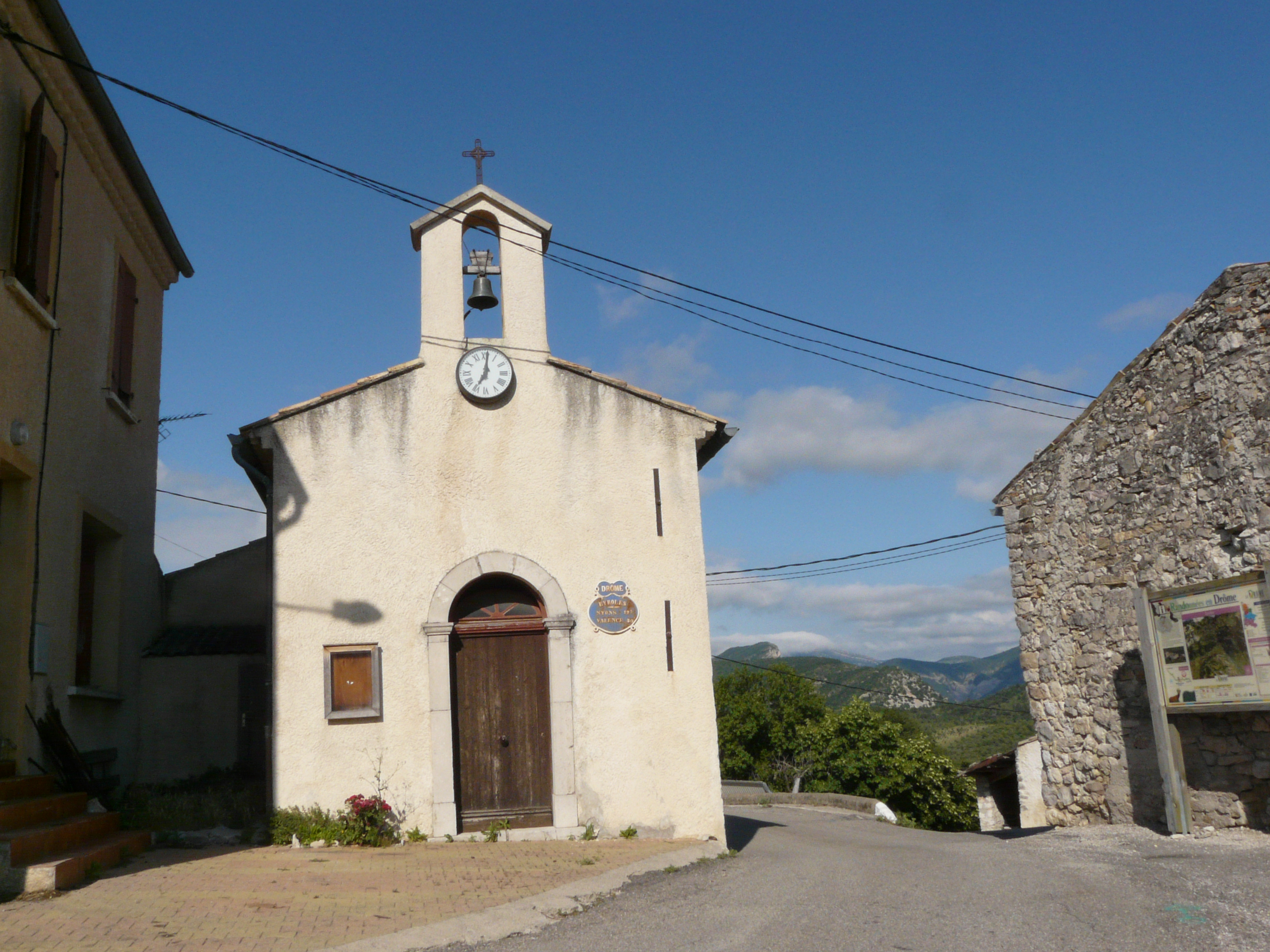 L'église du village d'Eyrolles, en Drôme provençale